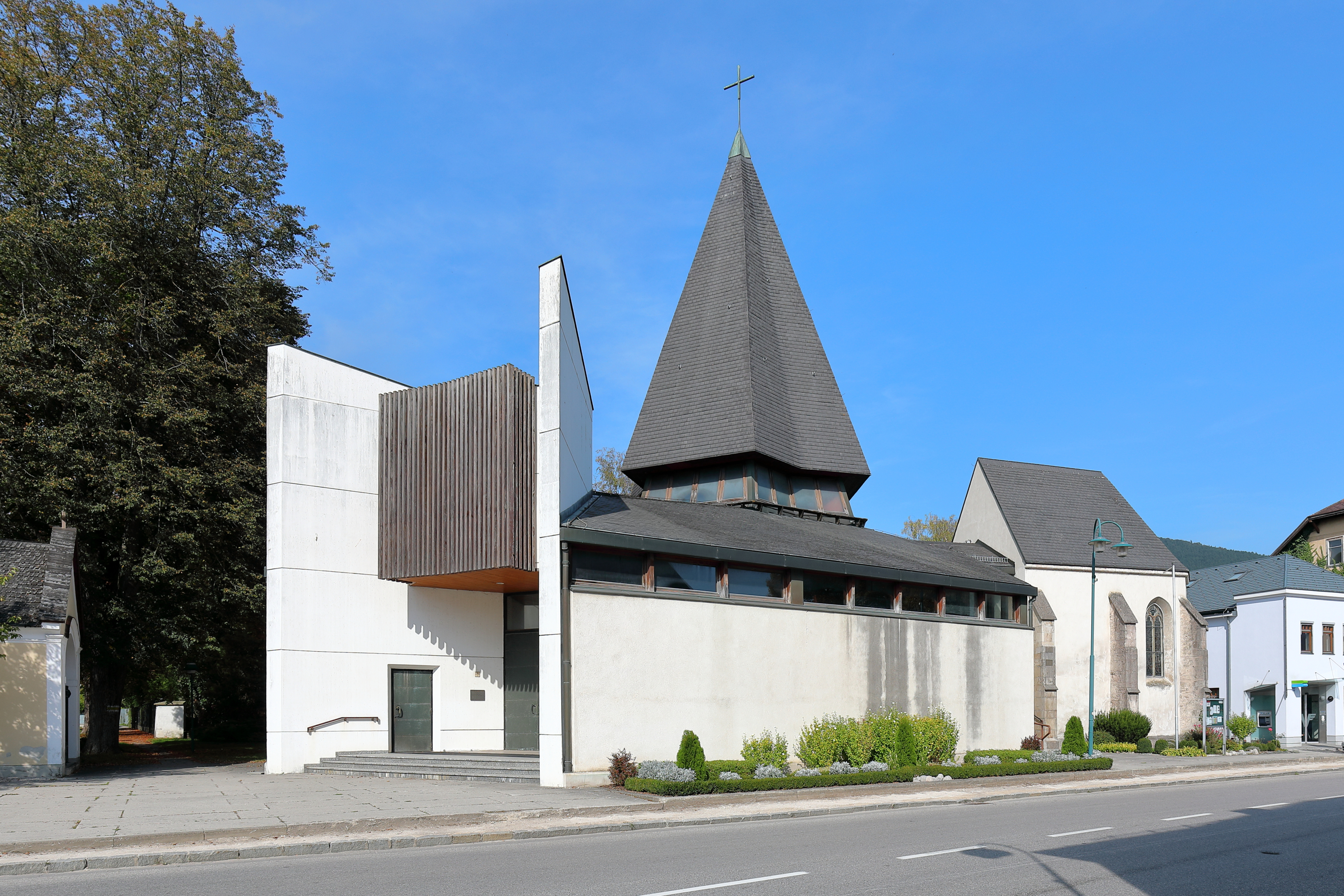 Südansicht der röm.-kath. Pfarrkirche hl. Nikolaus in der niederösterreichischen Marktgemeinde PernitzDie Kirche über unregelmäßigen Grundriss und als Zentralbau wurde anstelle einer barocken Vorgängerkirche von 1969 bis 1970 nach Plänen von Georg Lippert errichtet. Der gotische Chor der Vorgängerkirche wurde dabei als Seiten- bzw. Werktagskapelle integriert. Ganz links im Bild die ehemalige Friedhofskapelle.